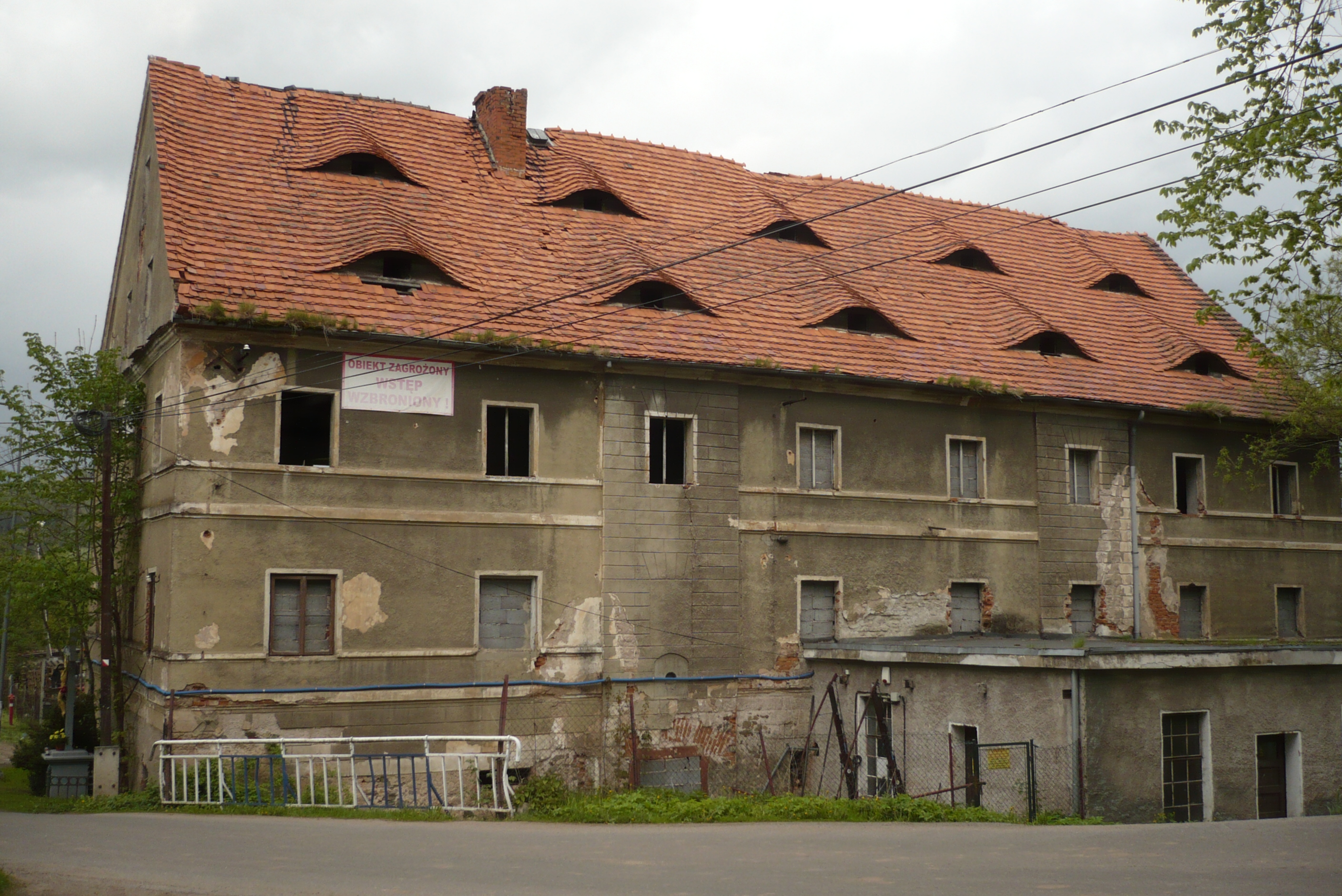 Młyn w Piszkowicach